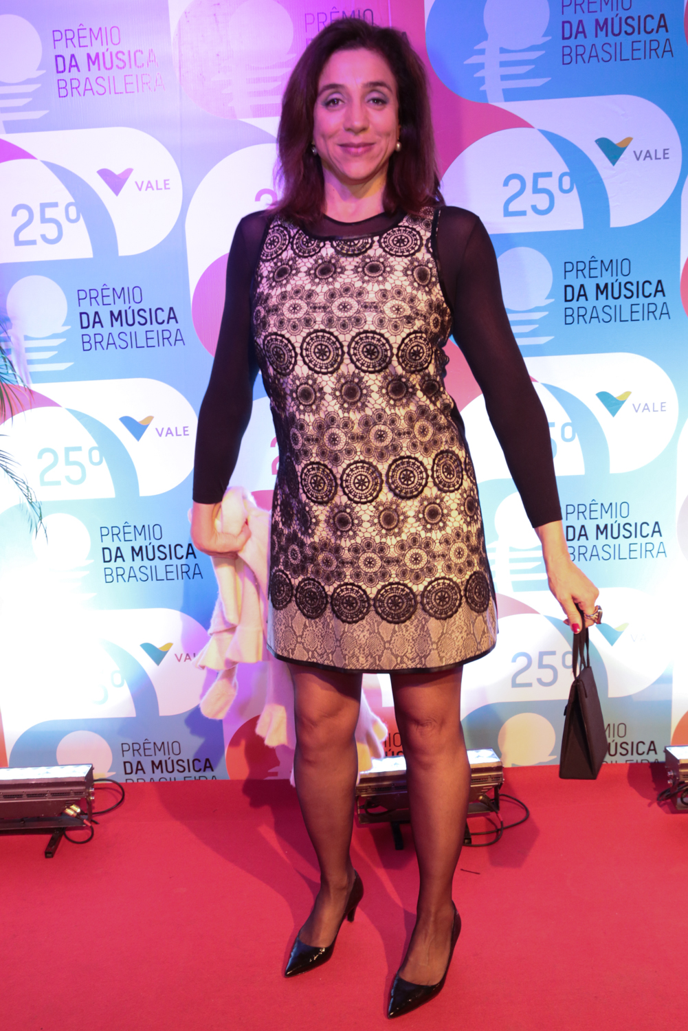 Marisa Orth durante o 25º Prêmio da Música Brasileira no Theatro Municipal. Foto: Reginaldo Teixeira (14/05/14)